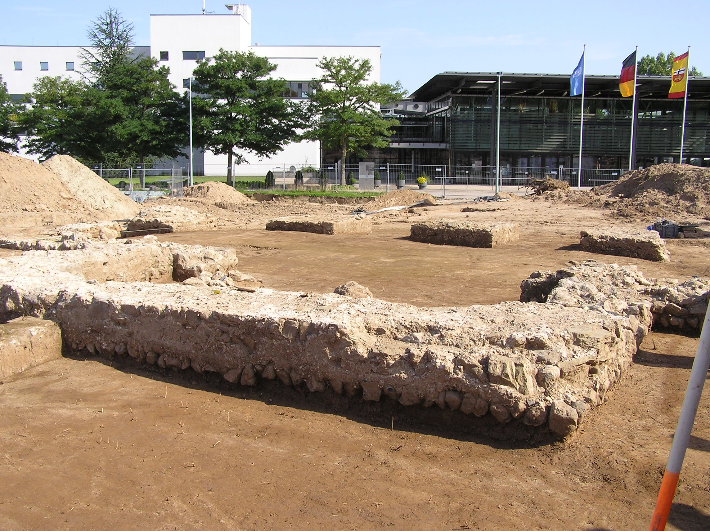 Fundamente des Monuments auf der Ausgrabungsstätte des vicus bonnensis in Bonn. Zu sehen ist die Nische (Vordergrund) und die Fundamente der rheinseitige Pfeilerreihe. Im Hintergrund ist das ehemalige Bundeshaus zu sehen.